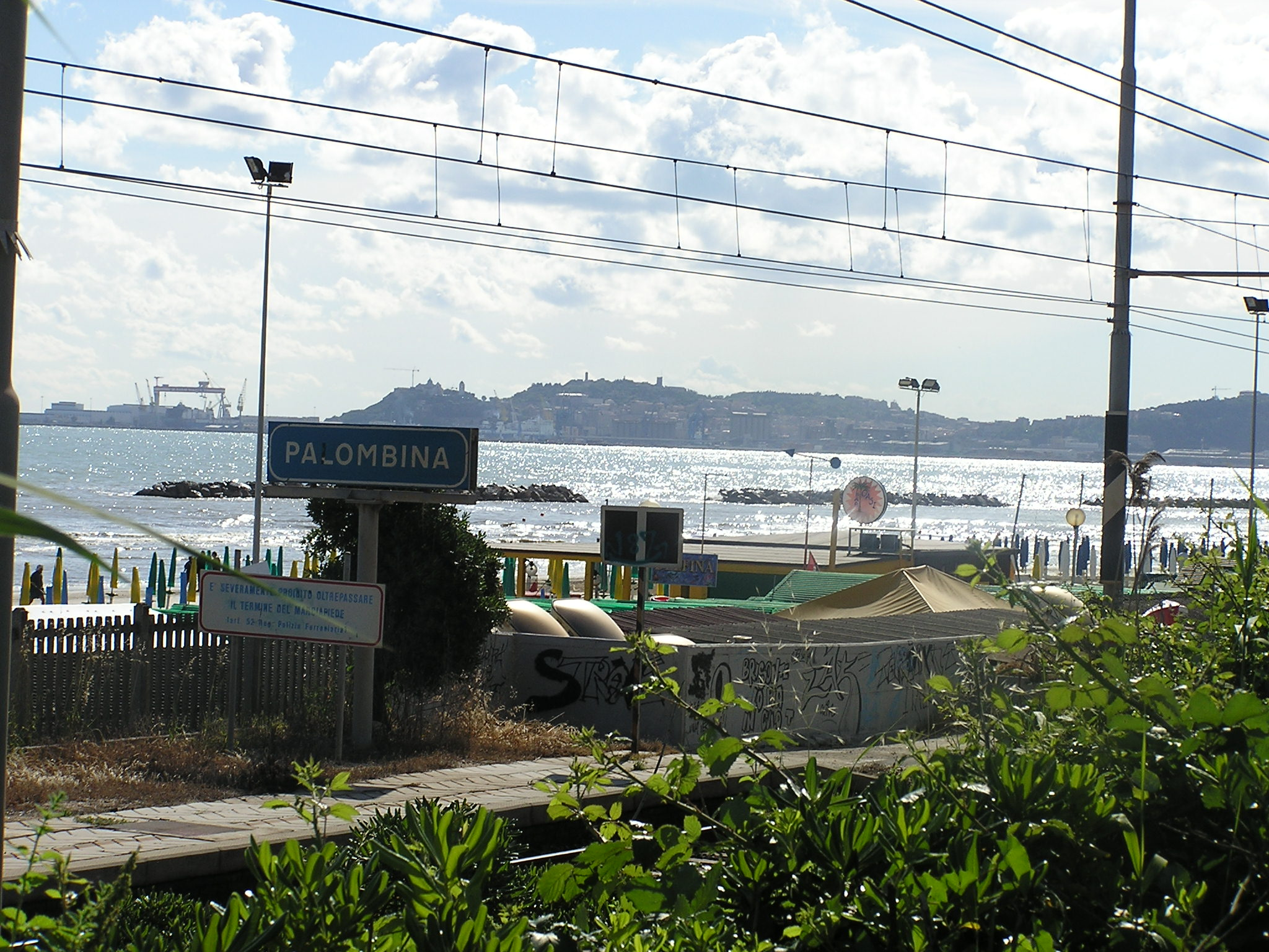 Golfo di Ancona (Italia), visto da Palombina.